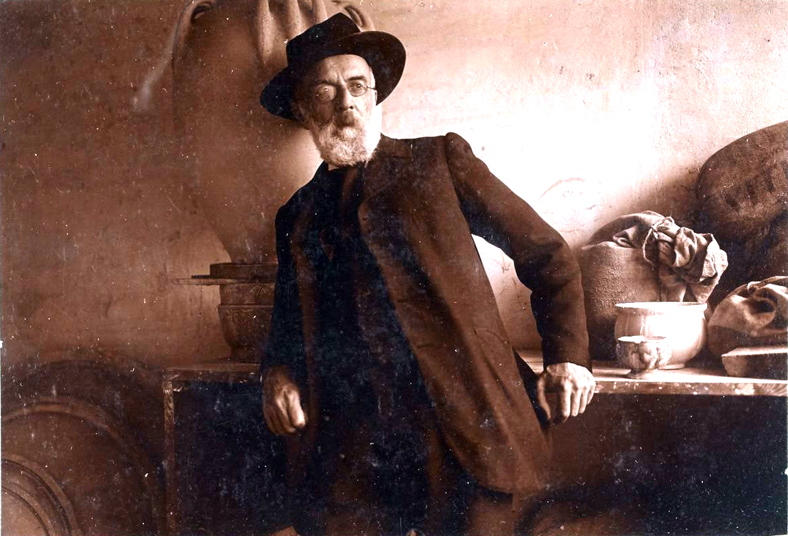 Ernest Chaplet chez lui par Dornac